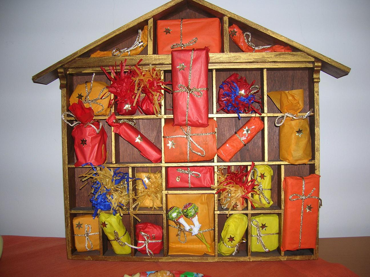 Adventkalender